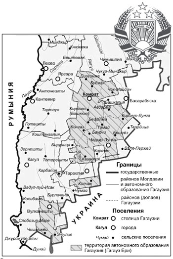 gagauz yeri